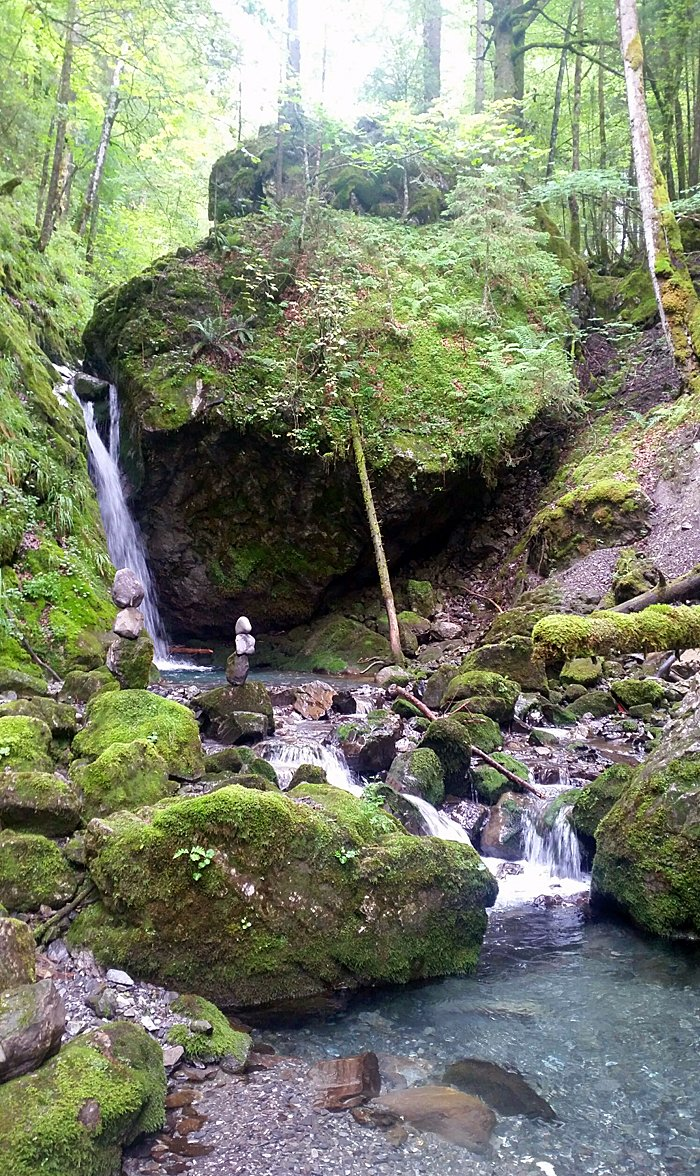 Der Aberenbach im Wägital, Kanton Schwyz